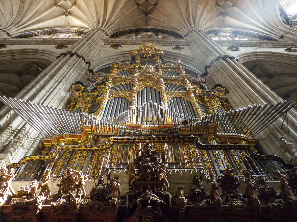 04082013 121348 SALAMANCA 0879